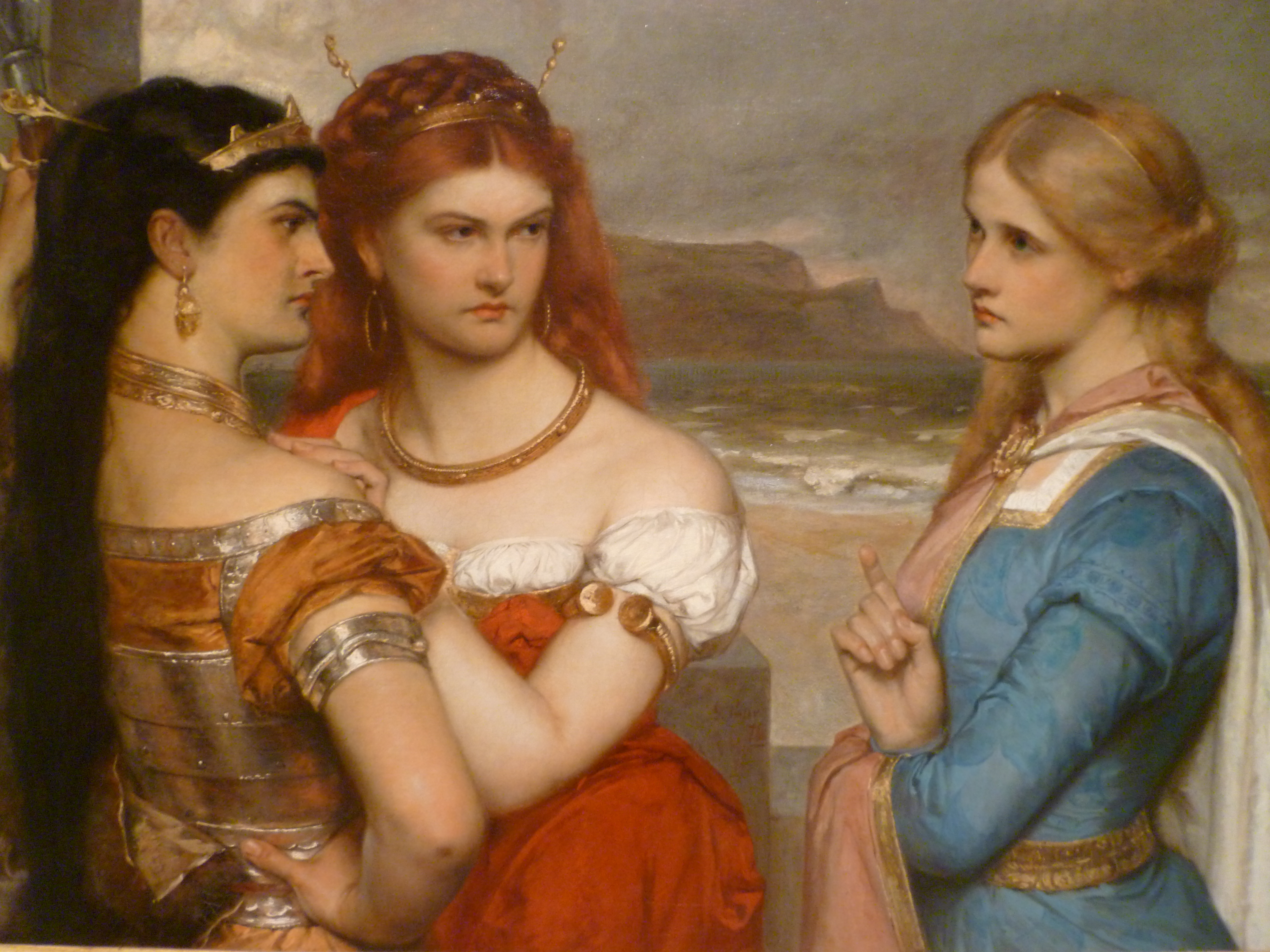 Gustav Pope (Austria 1831–1910 Londres), Las hijas del Rey Lear, ca. 1875–1876; óleo sobre tela; 44 1/2 x 32 5/16 in (113 x 82 cm) Colección Museo de Arte de Ponce. #71.0761